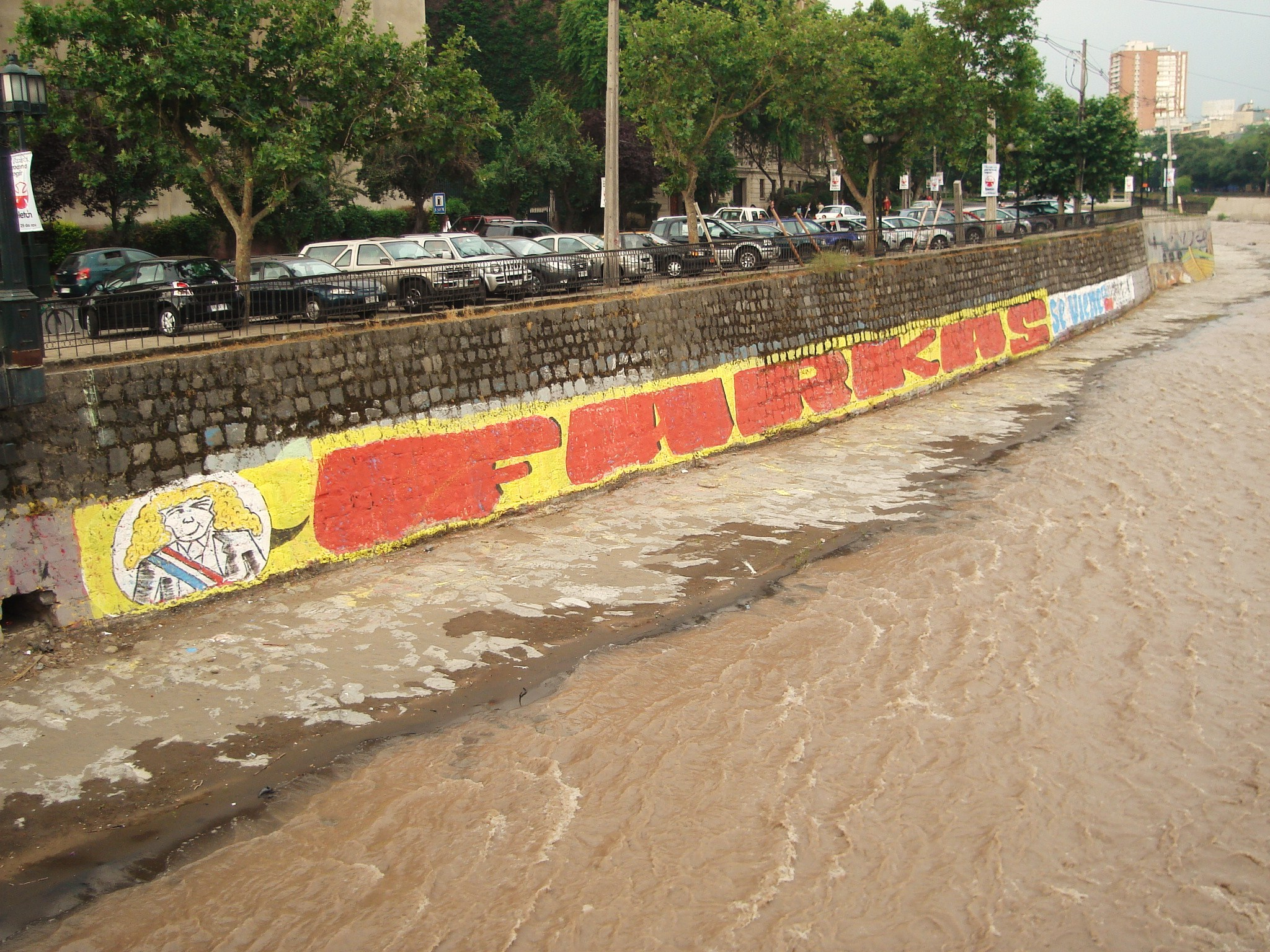 Mural en el río Mapocho aludiendo a una posible candidatura presidencial de Leonardo Farkas.